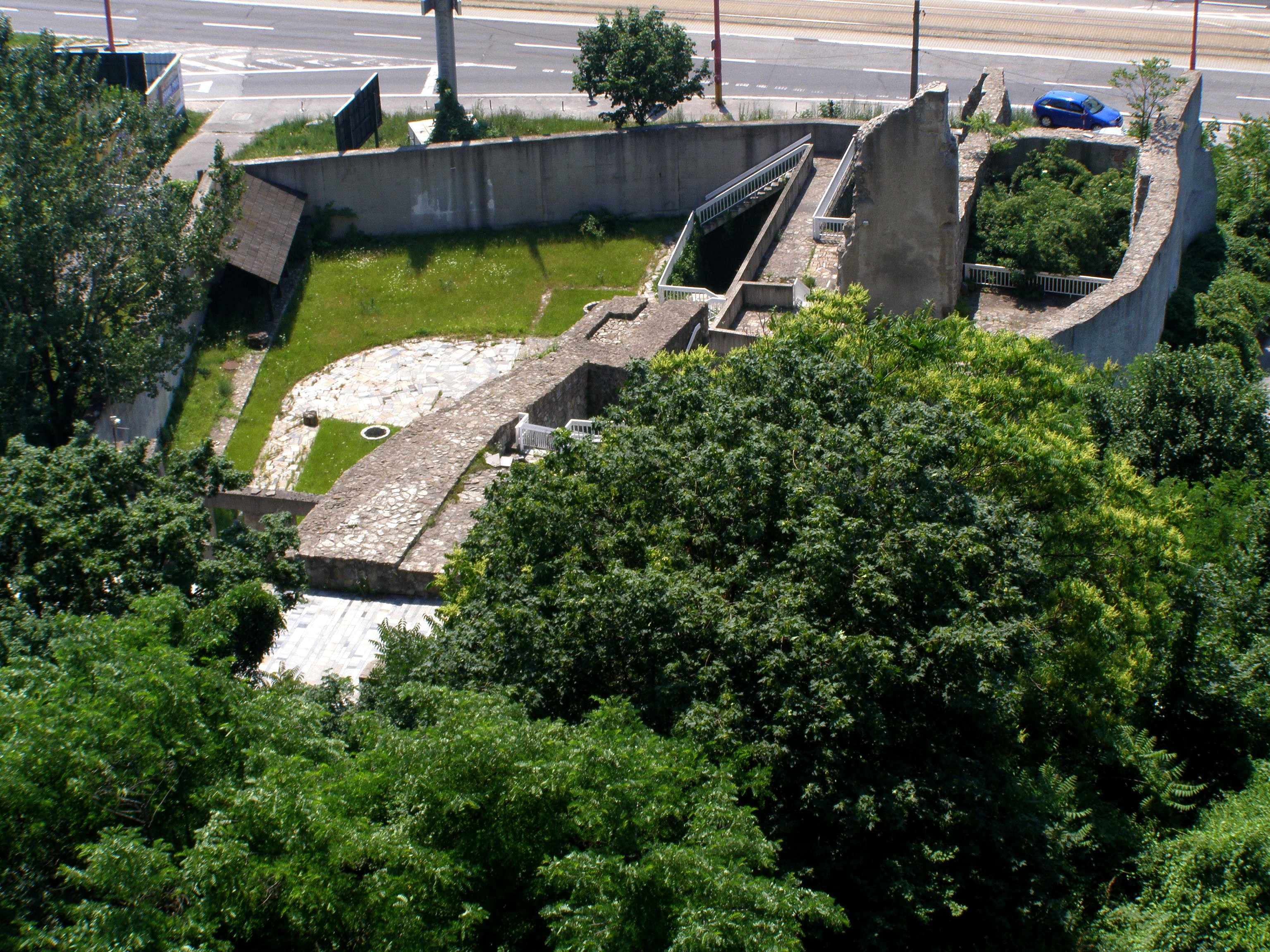 Pohľad na zvyšky Vodnej veže z hradného návršia